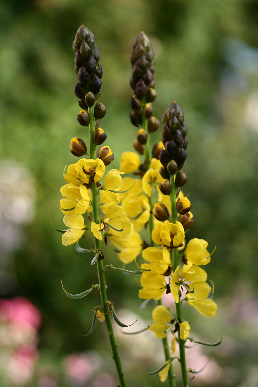 Beschreibung: Cassia Didymobotrya Senna didymobortia Quelle: selbst fotografiert Datum: Juli 2006 Fotograf: Karsten Dörre (grizurgbg)